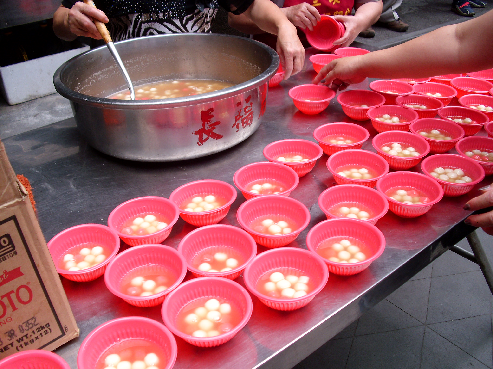 Bân-lâm-gú: 進香拜拜，食平安圓，佇三峽祖師廟翕的。